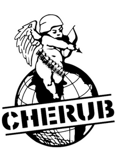 Ceci est le logo de la série de livres CHERUB.